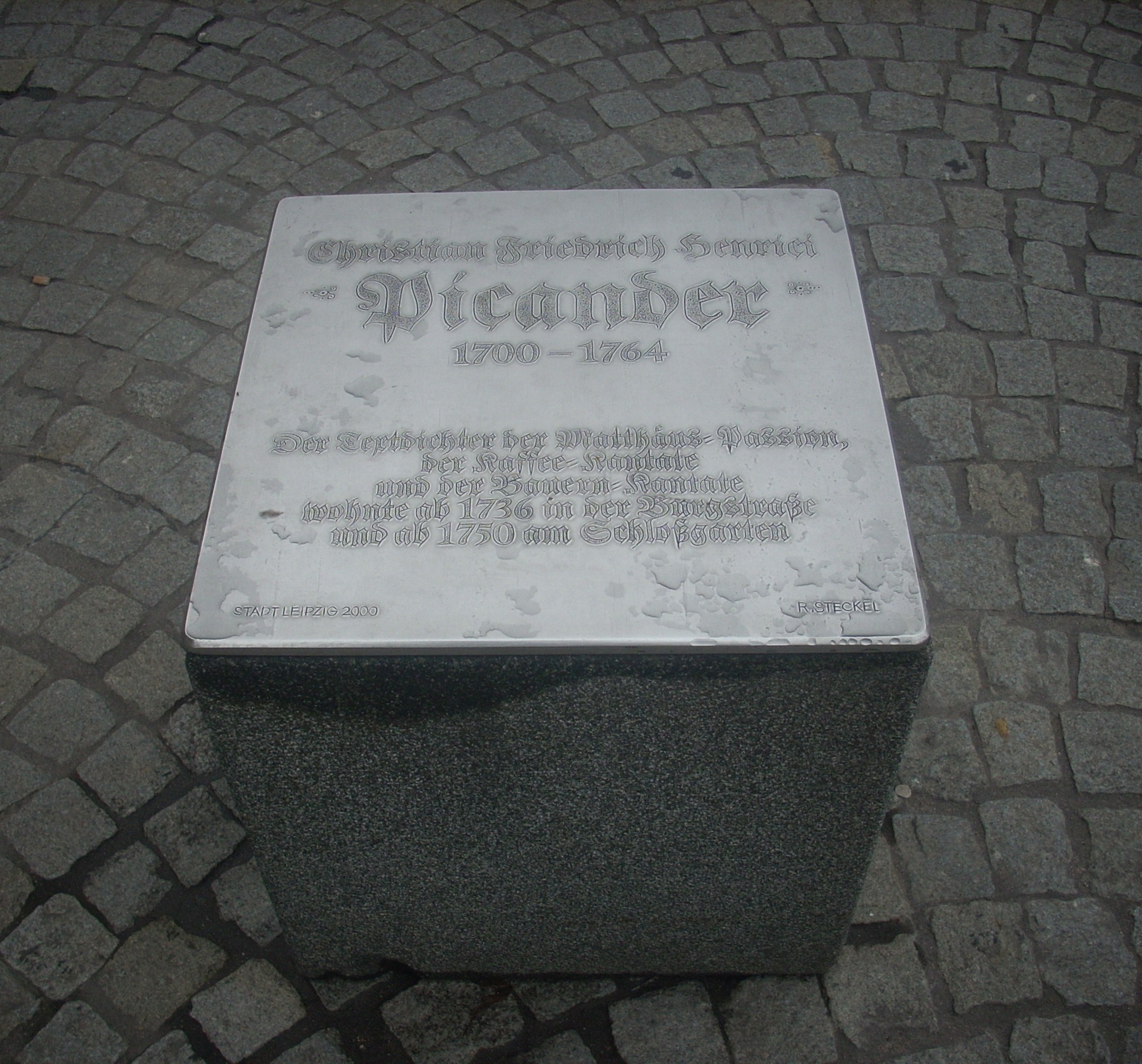 Leipzig, Burgplatz, Gedenktafel für Christian Friedrich Henrici, genannt Picander